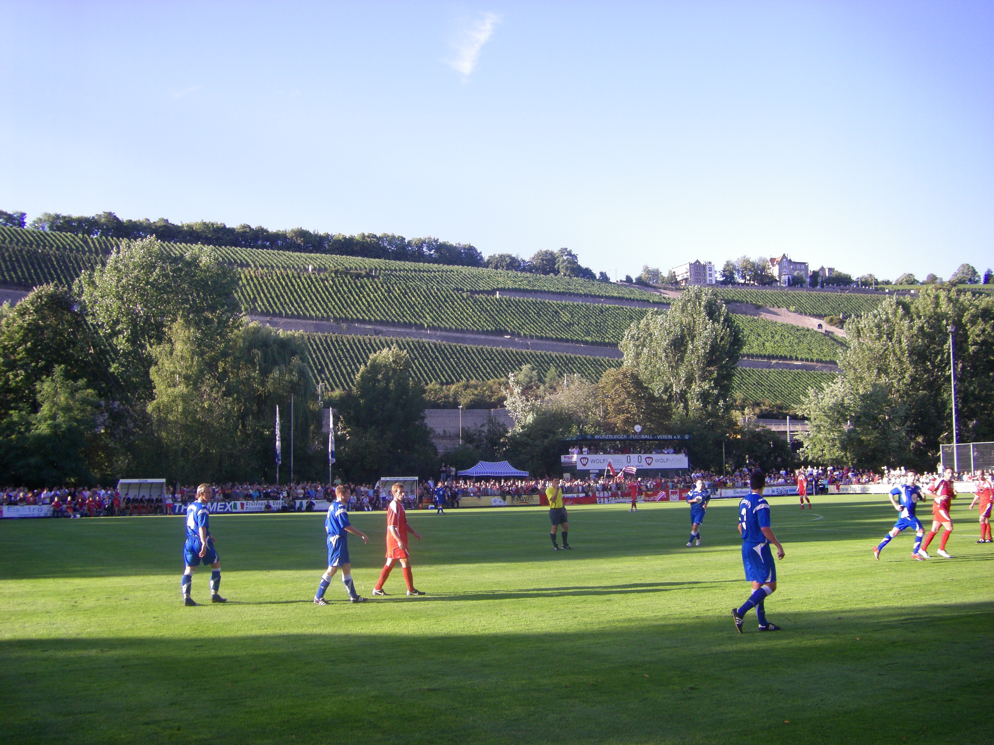 Sportstätte des Würzburger FV.